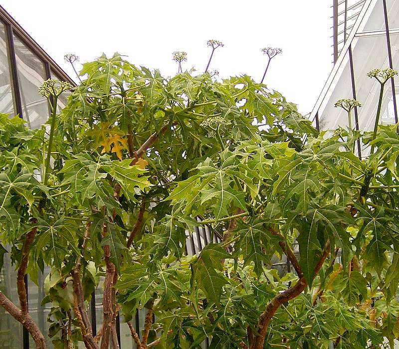 Cnidoscolus chayamansa BG Bochum, Germany